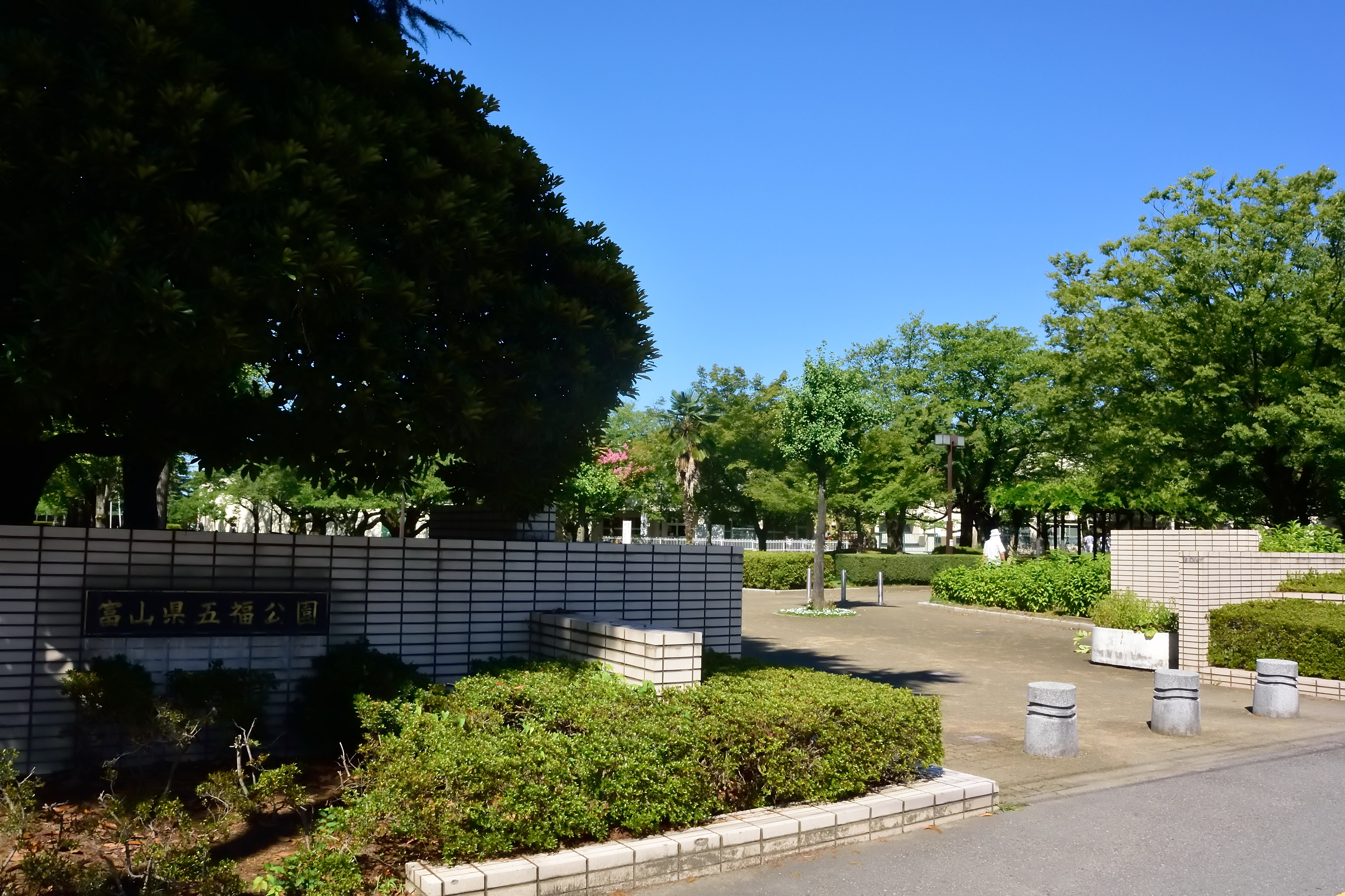 五福公園入口(北)